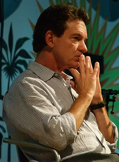 07.07.2007 Mesa 14 Foto: Sergio Fonseca